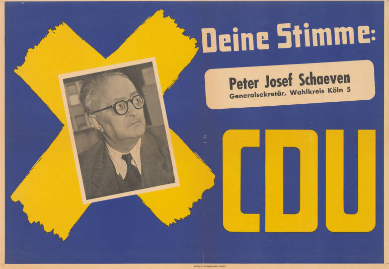 Deine Stimme: Peter Josef Schaeven Generalsekretär, Wahlkreis Köln 5 CDU Abbildung: Porträtfoto - Stimmkreuz Plakatart: Kandidaten-/Personenplakat mit Porträt Drucker_Druckart_Druckort: Kölnische Verlagsdruckerei GmbH Objekt-Signatur: 10-009 : 249.29 Bestand: Landtagswahlplakate Nordrhein-Westfalen (10-009) GliederungBestand10-18: Landtagswahlplakate Nordrhein-Westfalen (10-009) » Landtagswahl am 18.6.1950 » CDU » mit Porträtfoto Lizenz: KAS/ACDP 10-009 : 249.29 CC-BY-SA 3.0 DE